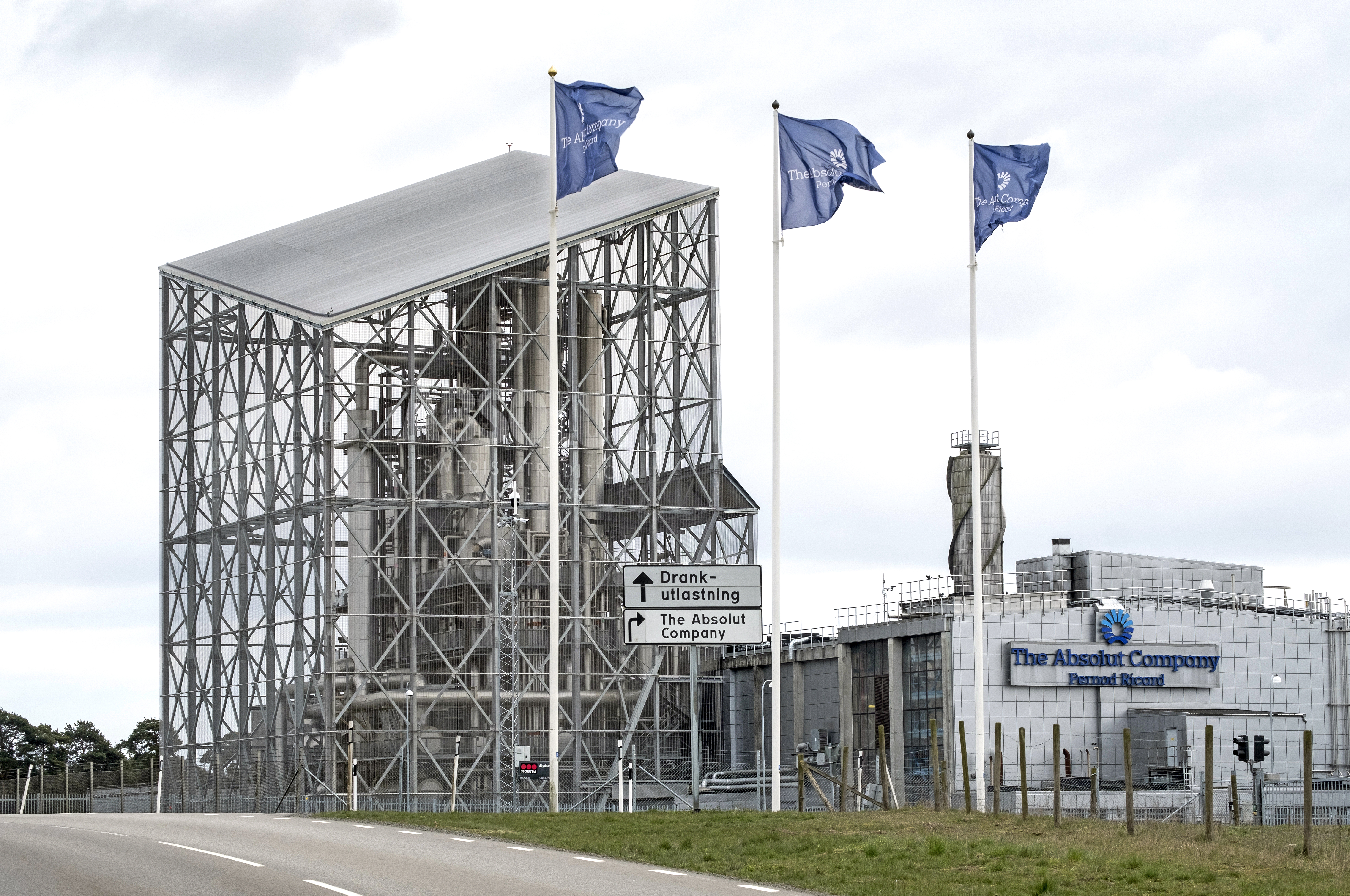 Gärdsbränneriet strax söder om Kristianstad där The Absolut Company, ägt av franska Pernod Ricard, tillverkar Absolut Vodka som sedan smaksätts och tappas på buteljer vid anläggningen inne i Åhus. Foto: 20190413..Photo: News Øresund.© News Øresund Johan (CC BY 3.0)..Detta verk av News Øresund är licensierat under en Creative Commons Erkännande 3.0 Unported-licens (CC BY 3.0). Bilden får fritt publiceras under förutsättning att källa anges. .The picture can be used freely under the prerequisite that the source is given. News Øresund, Malmö, Sweden.News Øresund är en oberoende regional nyhetsbyrå som är en del av det oberoende dansk-svenska kunskapscentrat Øresundsinstituttet...